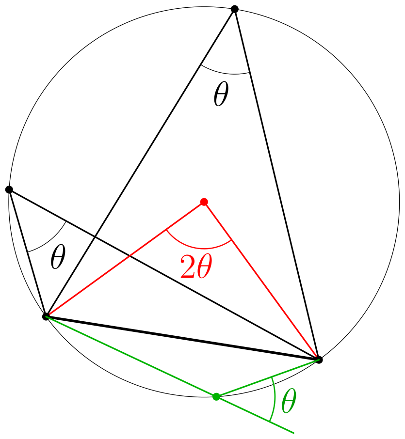 Randvinkelsatsen